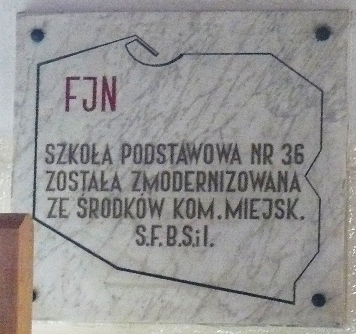 Szkołą przy ul. Słowackiego 54/60 w Poznaniu.